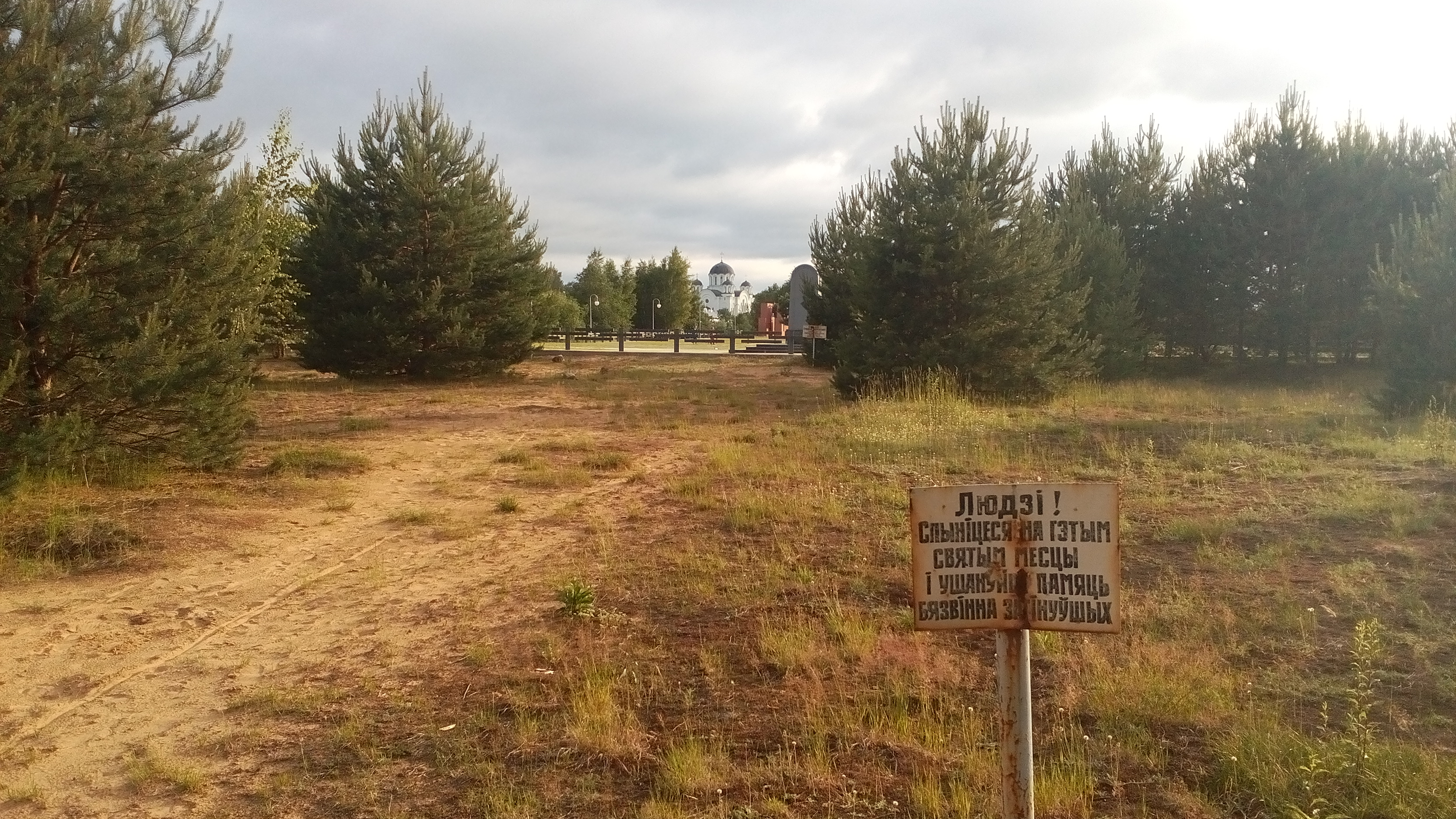 21 июня 2020 Урочище Пески